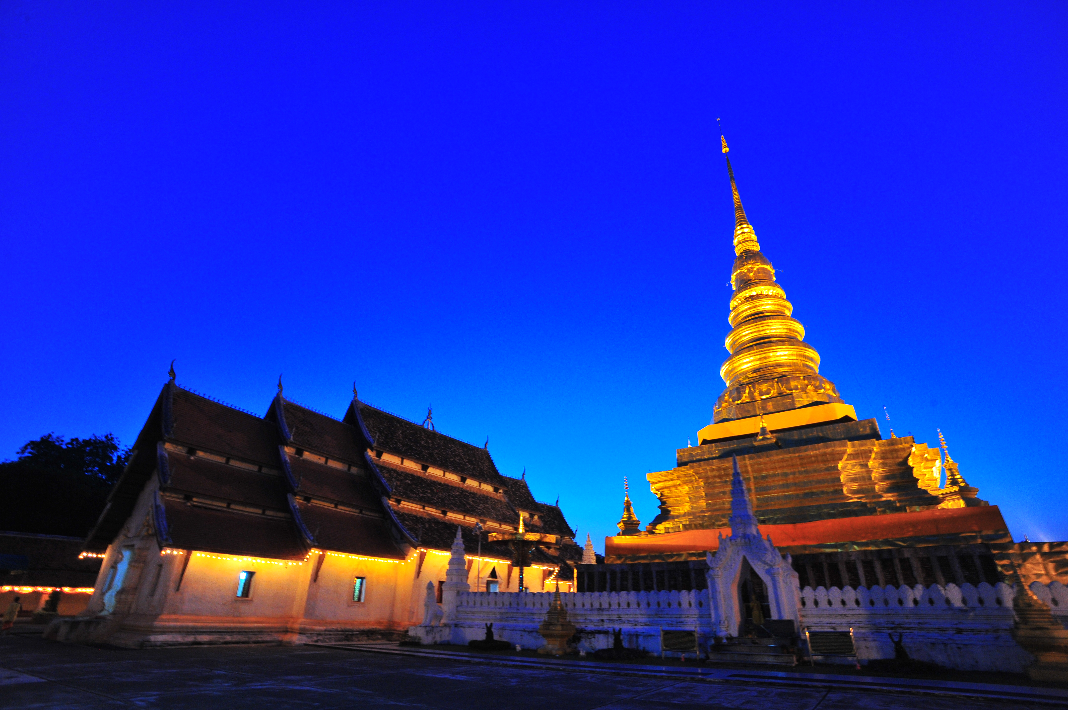 วัดพระธาตุแช่แห้ง